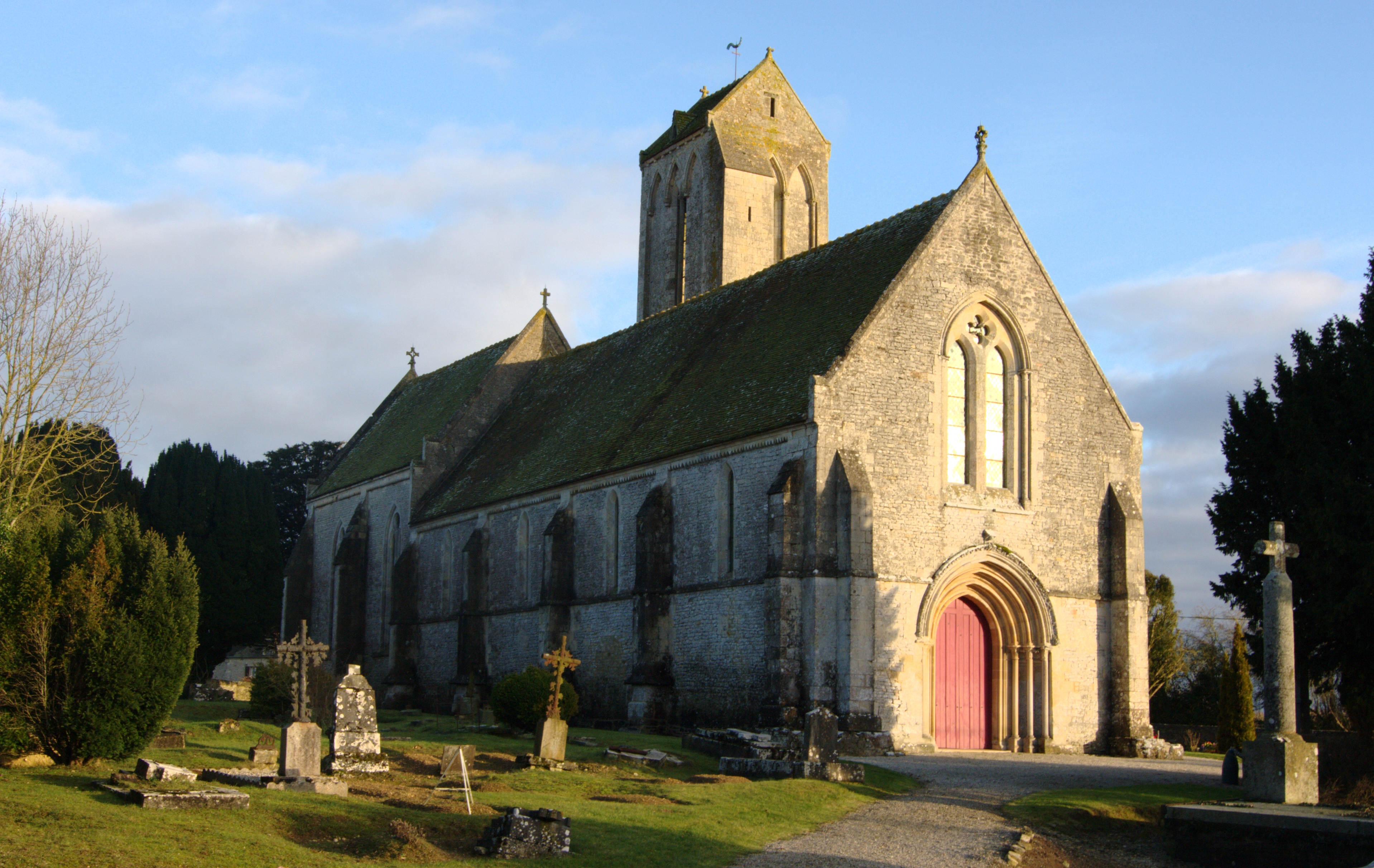 L'église de la Nativité-de-Notre-Dame à Soulangy, Calvados.